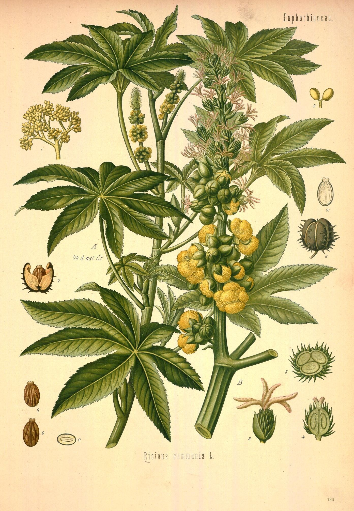 Wunderbaum. A oberer Theil der Pflanze in 1/4 der nat. Grösse; B Blüthenknospe in nat. Grösse; 1 ein Staubgefässbündel, vergrössert; 2 Staubgefässpaar, desgl.; 3 weibliche Blüthe, desgl.; 4 Stempel im Längsschnitt, desgl.; 5 Fruchtknoten im Querschnitt, desgl.; 6 reife Frucht, nat. Grösse; 7 ein aufgesprungenes Gehäuse derselben, desgl.; 8 und 9 Same an der Rücken- und Bauchseite, desgl.; 10 und 11 derselbe im Längs- und Querschnitt, desgl.